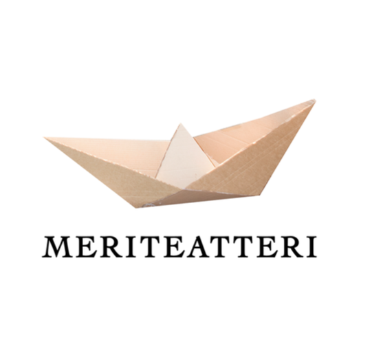 Meriteatteri